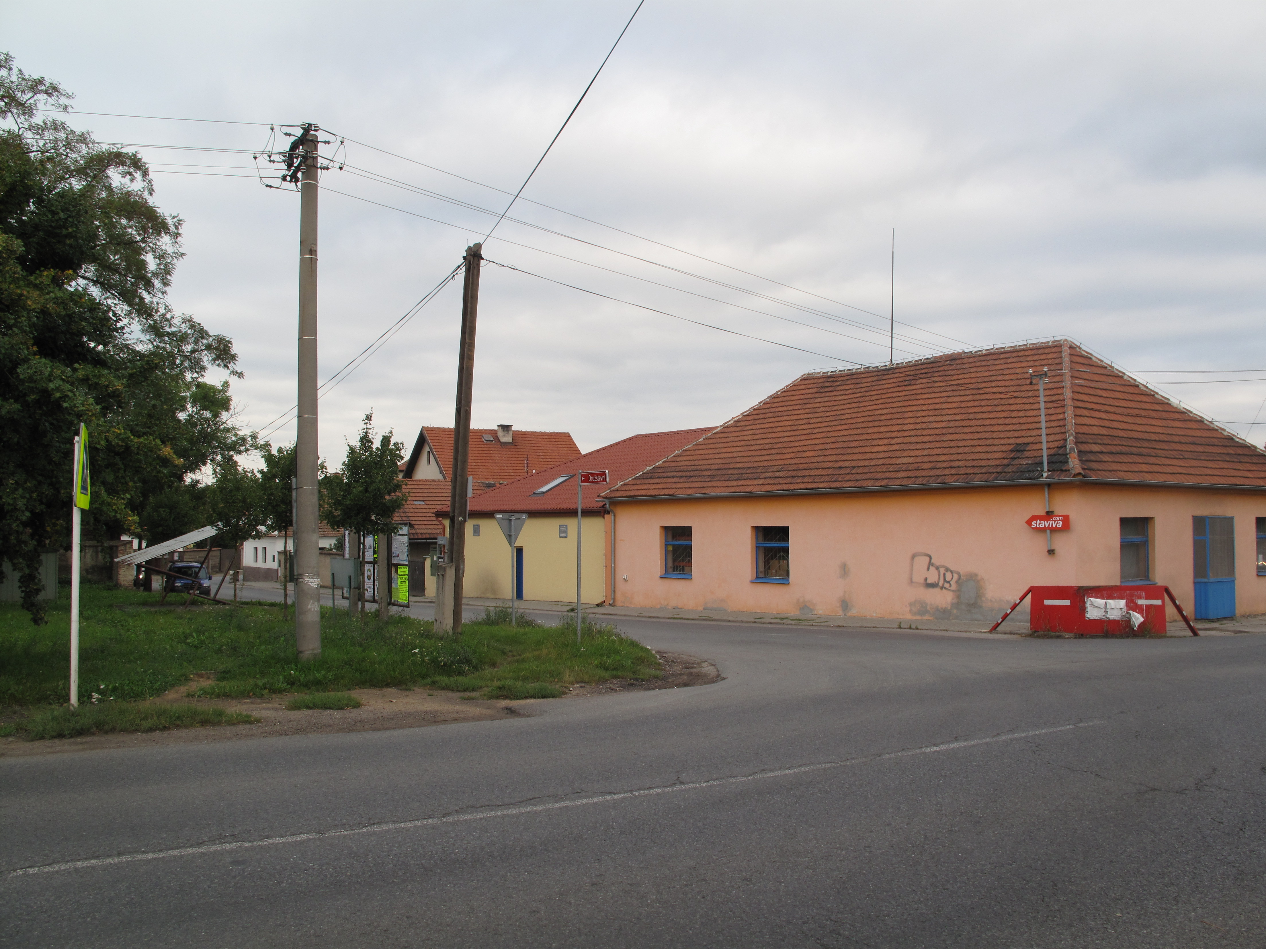 Byškovice